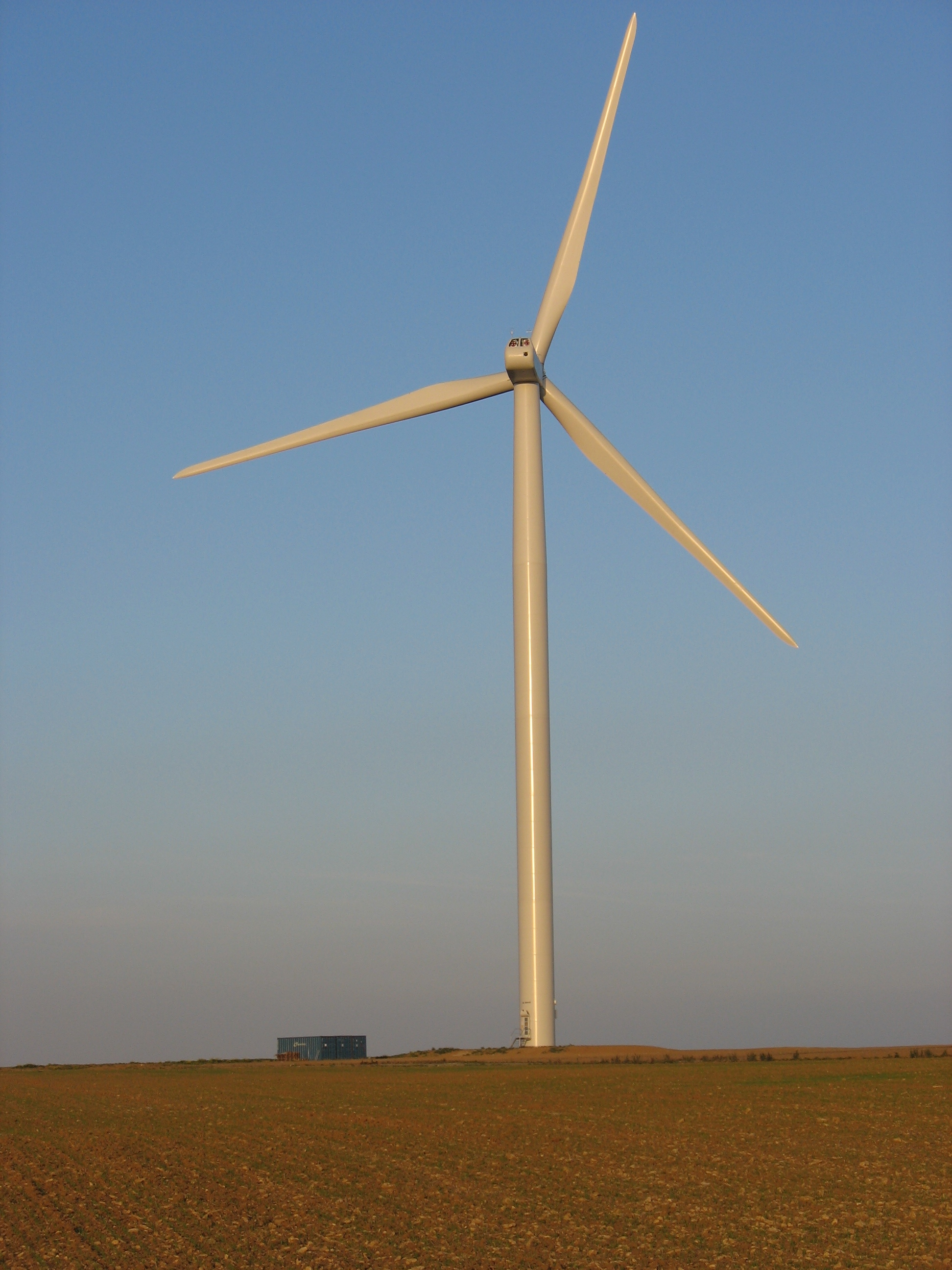 Une éolienne du plateau de Boulay